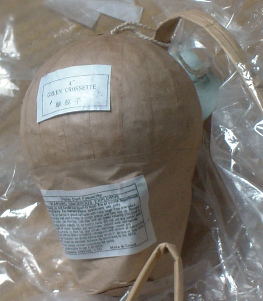 mortierbom 100mm 4inch - eigen materiaal